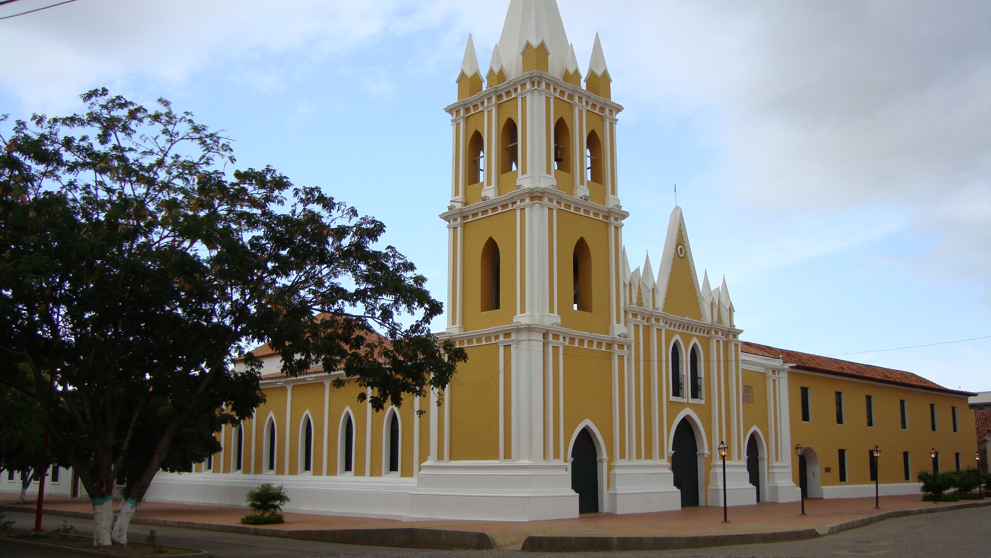 Iglesia de San Francisco en Coro, Estado Falcón.